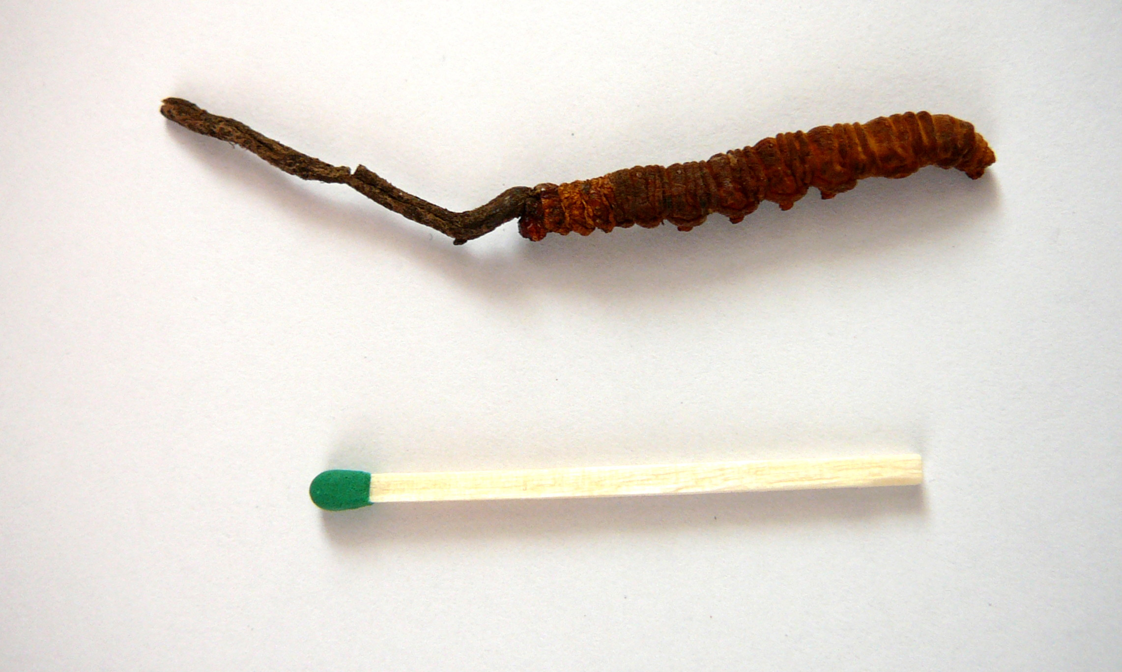 In Nepal geernteter Chinesischer Raupenpilz - Cordyceps sinensis - Yartsa Gunbu.